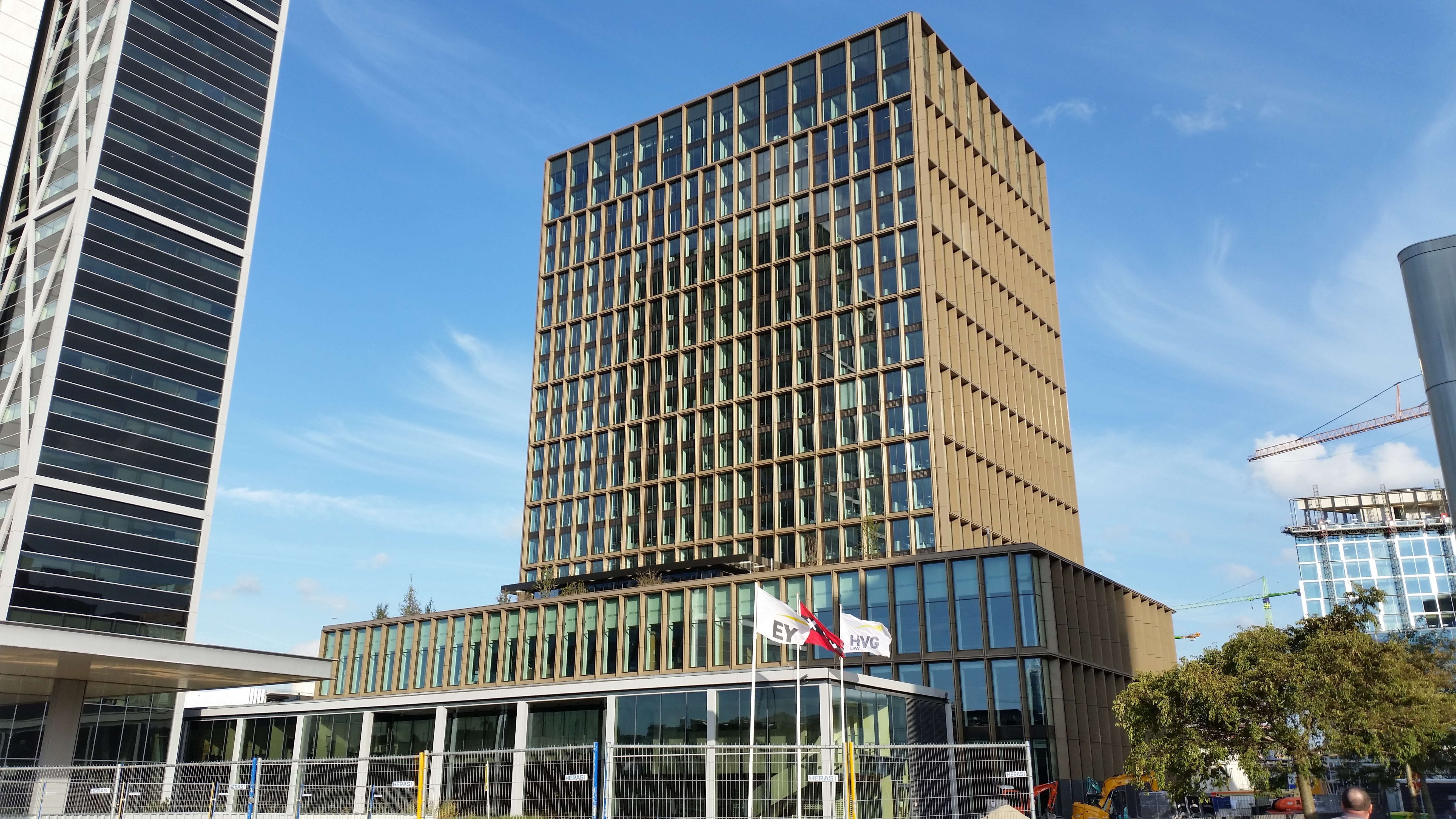 Vivaldi building vlak voor oplevering